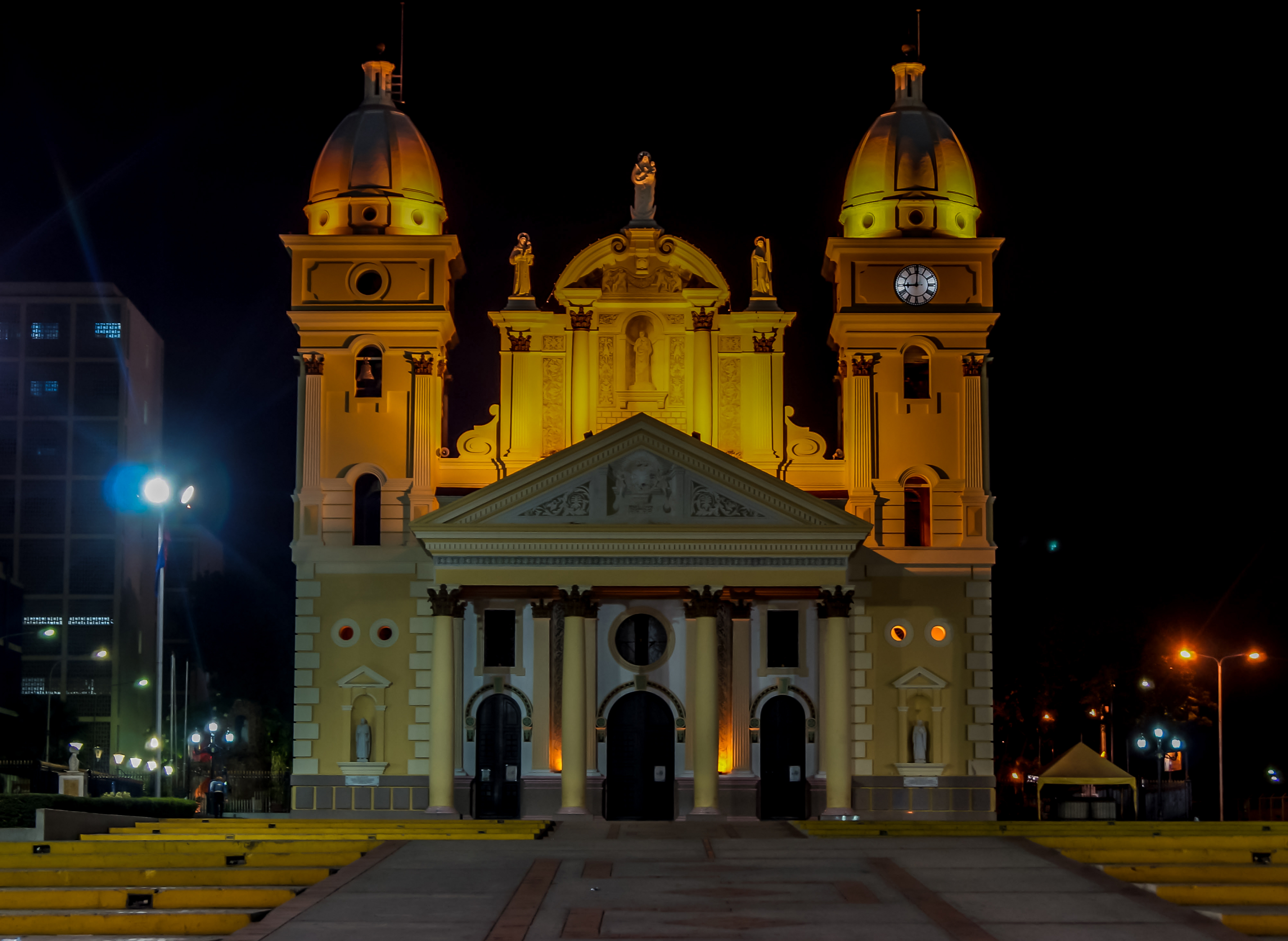 Basilica (La Chinita)